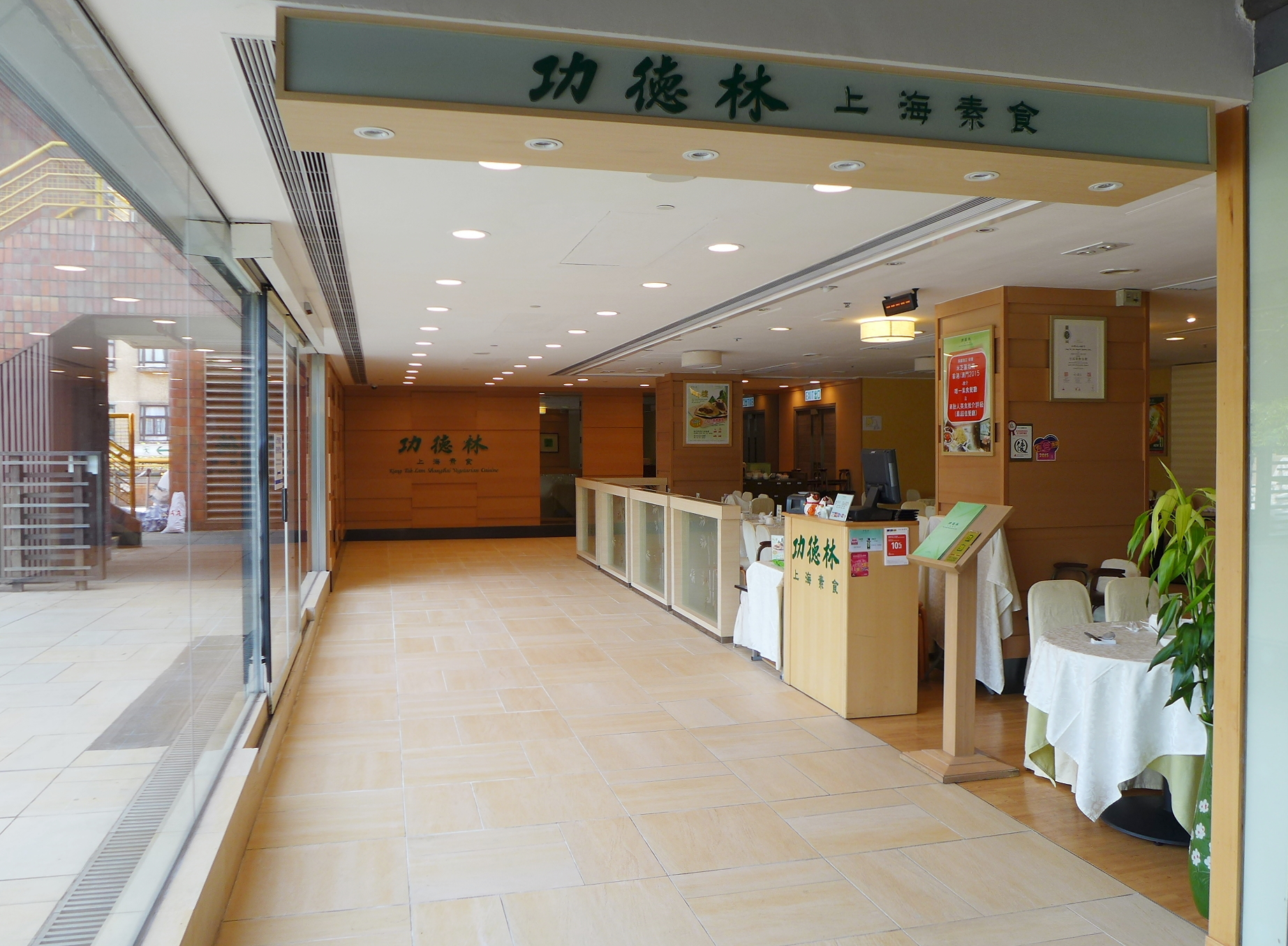 Kung Tak Lam Shanghai Vegetarian Cuisine in New Town Plaza